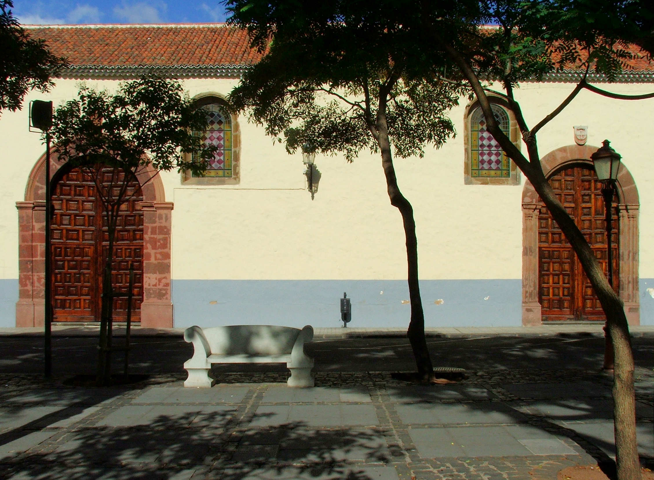 Fassade der Kirche des Klosters Santa Catalina La Laguna